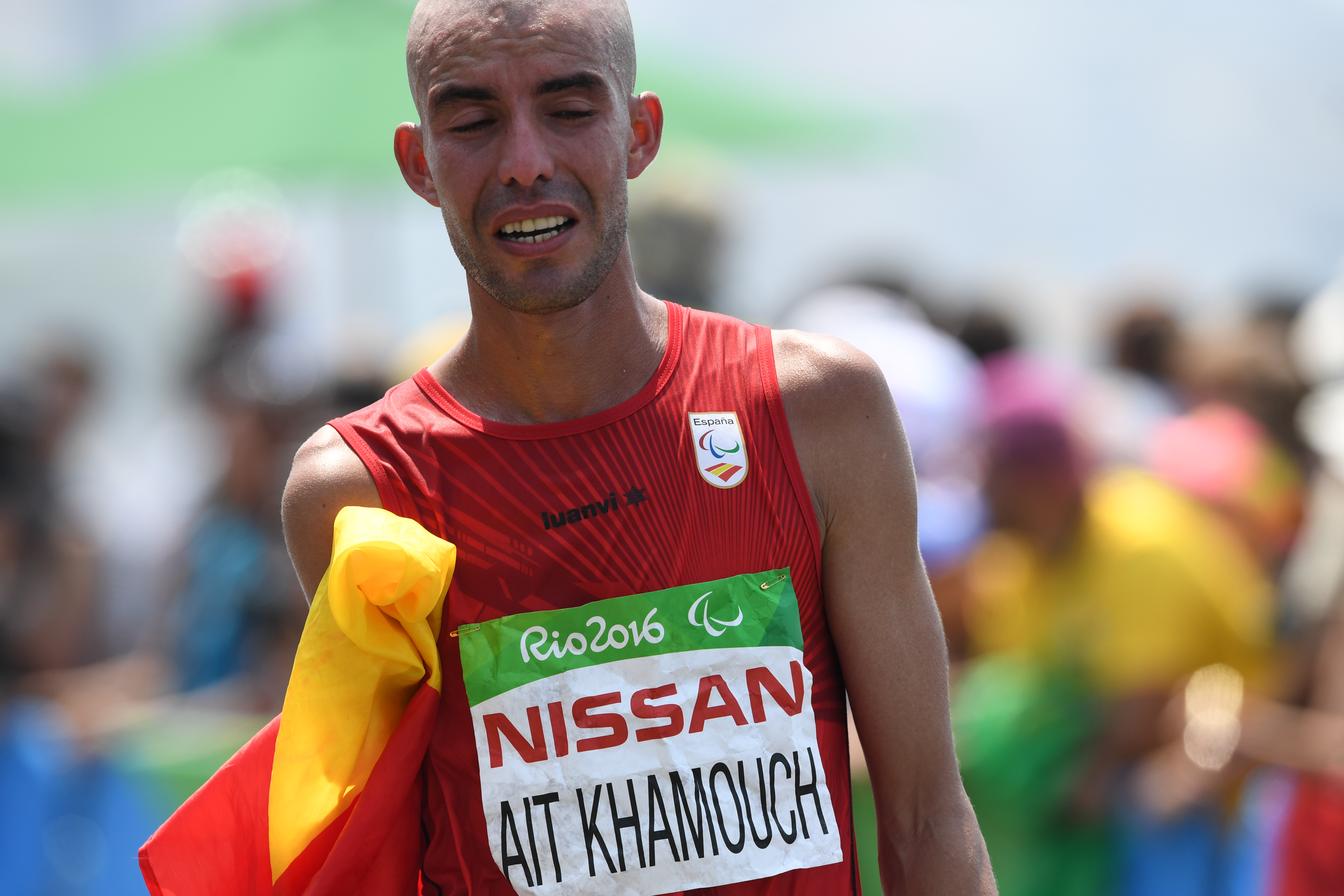 Rio de Janeiro - O espanhol, Abderrahman Ait foi medalha de prata na categoria T46 na maratona Paralímpica T12 e T46, na praia de Copacabana (Tânia Rêgo/Agência Brasil)